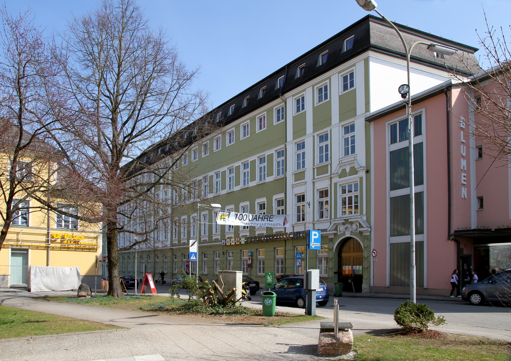 Gebäude der 1911 eröffneten Bürgerschule der Franziskanerinnen in der oberösterreichischen Stadt Vöcklabruck.